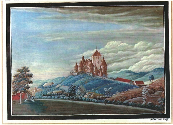 Hofmaler Johann Andreas Wolf Schloss Wörth an der Donau um 1700